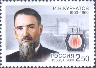 Почтовая марка России - Курчатов Игорь Васильевич